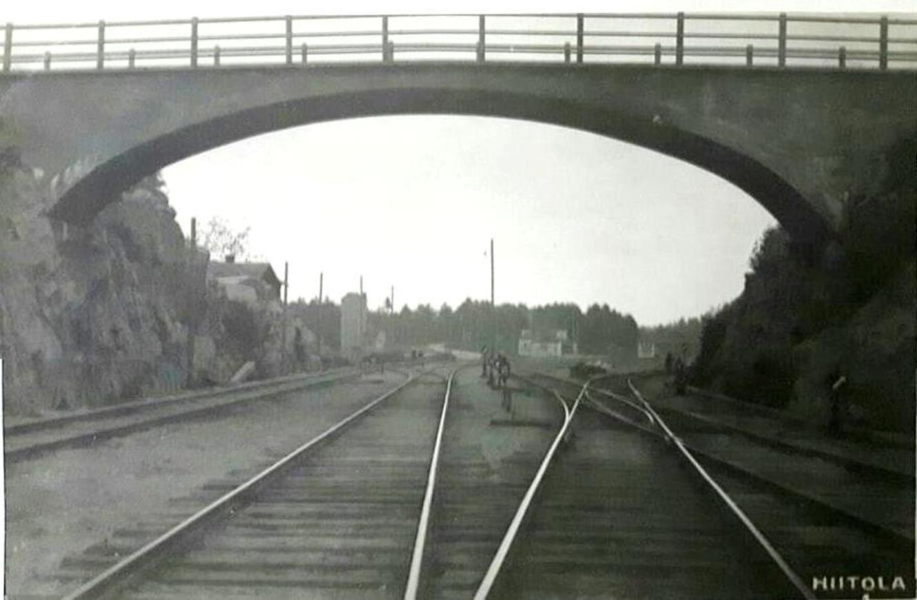 ст. Хийтола 2